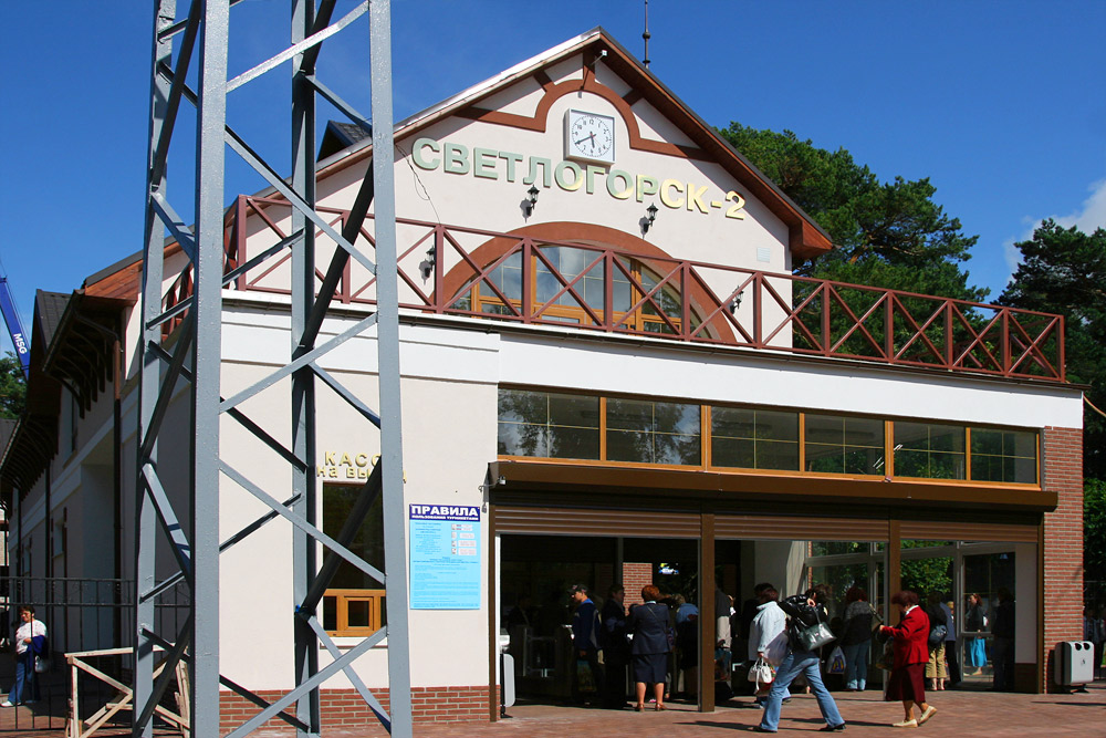 Svetlogorsk/Raushen/Светлогорск. Железнодорожная станция Светлогорск-2, открытая в 2006-2007 году.